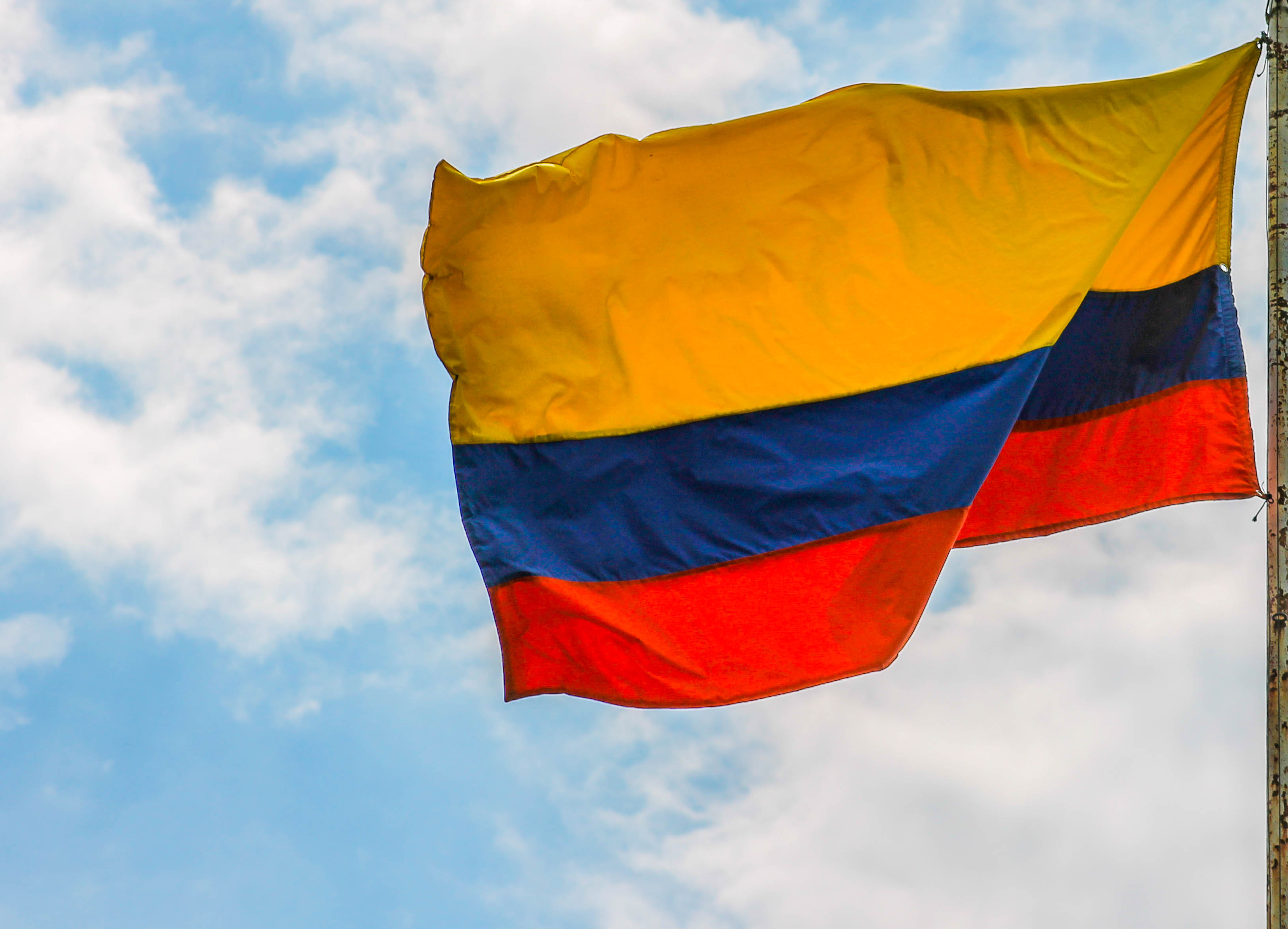 Elevada en Bucaramanga, representa el pabellón de Colombia.